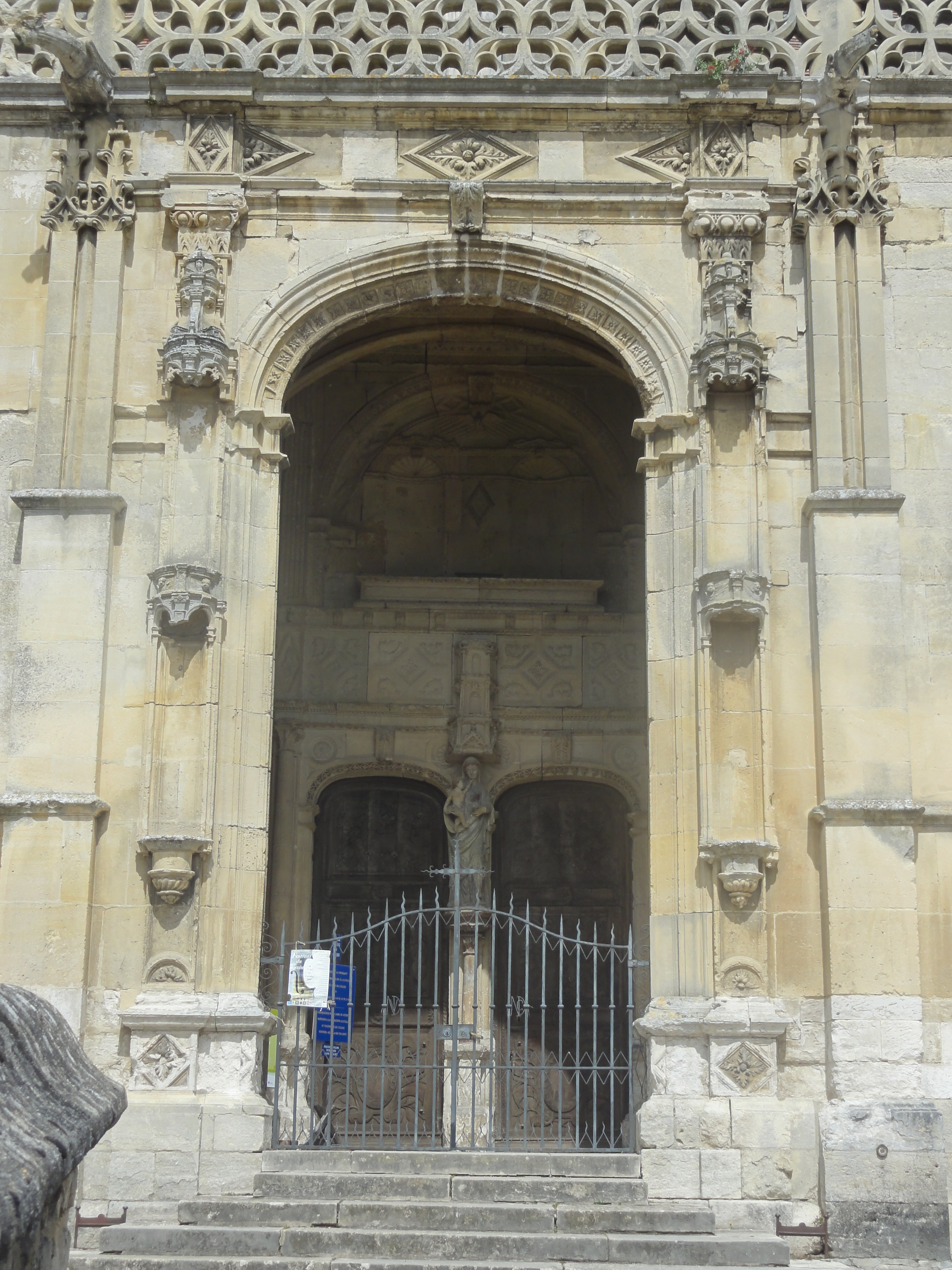 Portail sud.